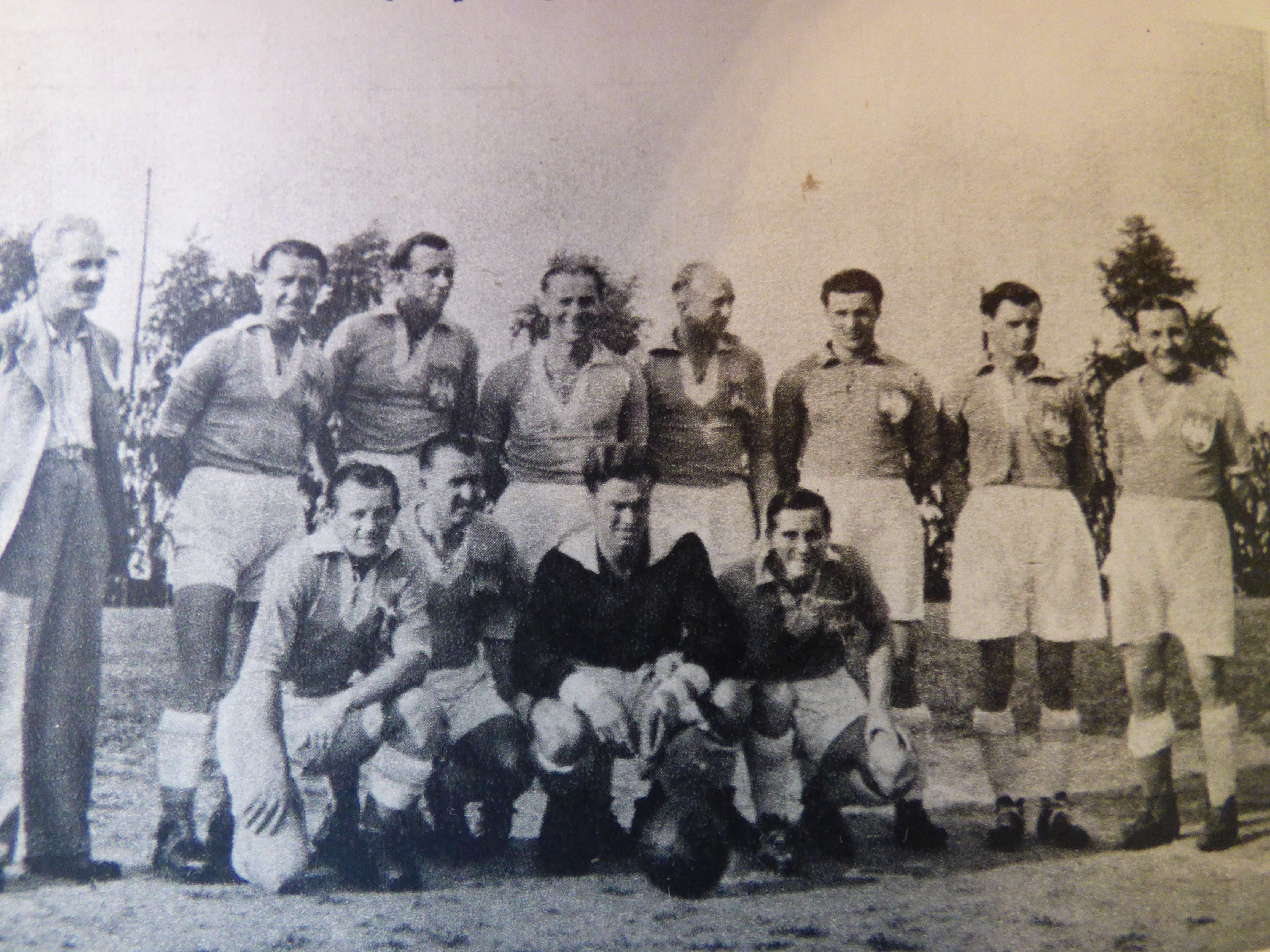 Reprezentacja Śląska przed meczem towarzyskim z reprezentacją Brna (21 czerwca 1947 roku).